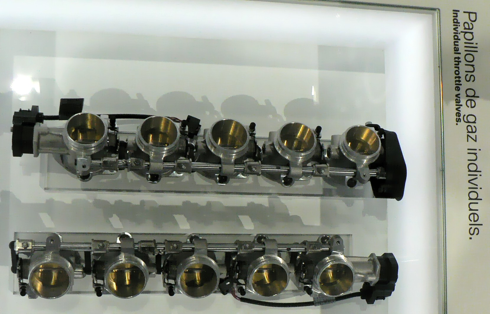 Mondial de l'automobile, Paris 2006